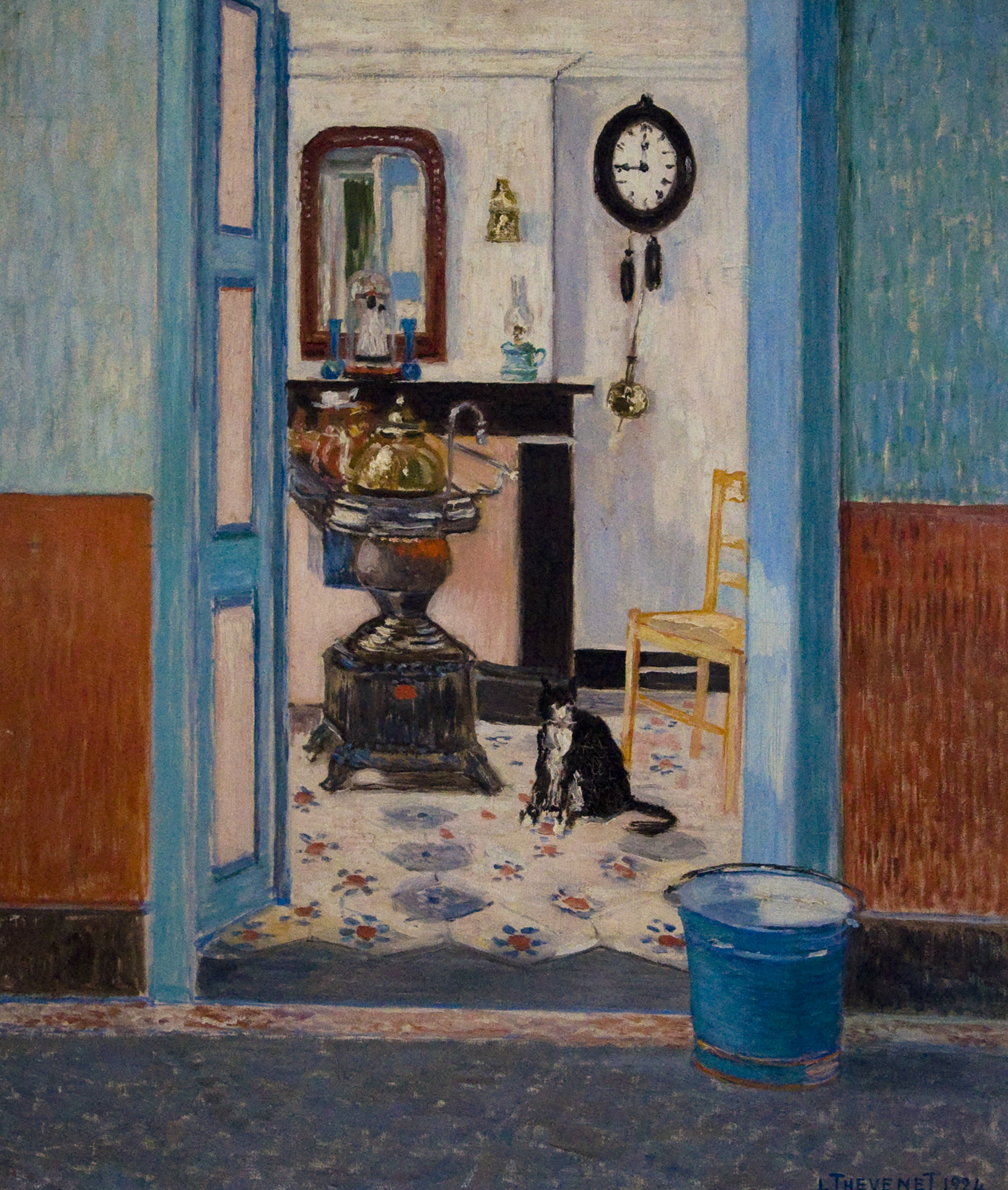 Louis Thevenet - De keuken - (1924) - in het Museum Dhondt-Dhaenens te Deurle, België